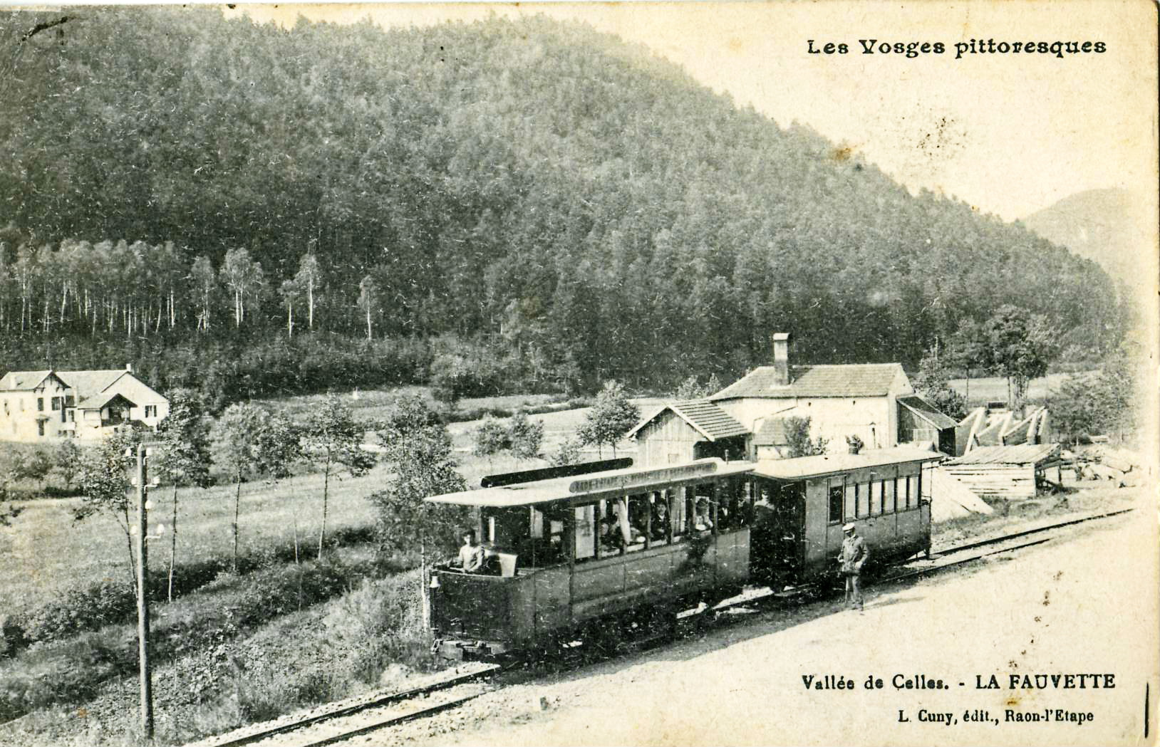 Carte postale ancienne éditée par L. Cuny à Raon-l'Étape, collection Les Vosges pittoresques :Vallée de Celles - LA FAUVETTE.